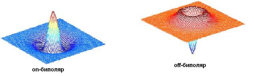 Рецептивное поле биполяров